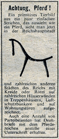 Ausschnitt eines Artikels in der deutschen Truppenzeitschrift "Nachrichten für die Truppe" No. 297, 7th February 1945